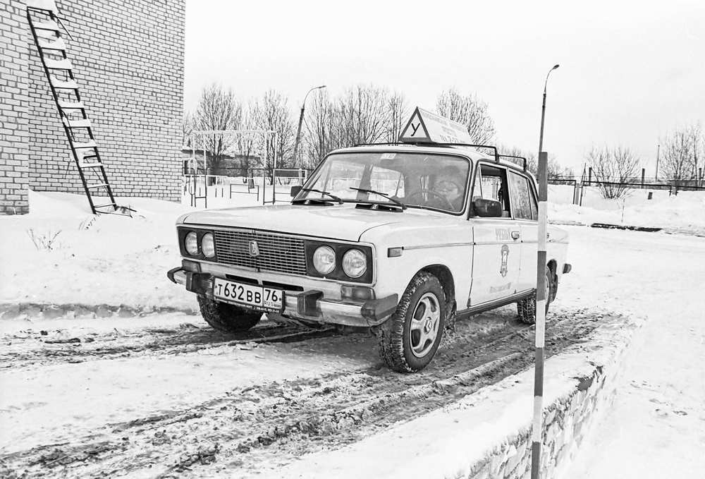 Автомобиль ВАЗ-2106 номер т632вв-76 около Переславской автошколы РОСТО ДОСААФ. Переславль, улица Свободы, дом 100.